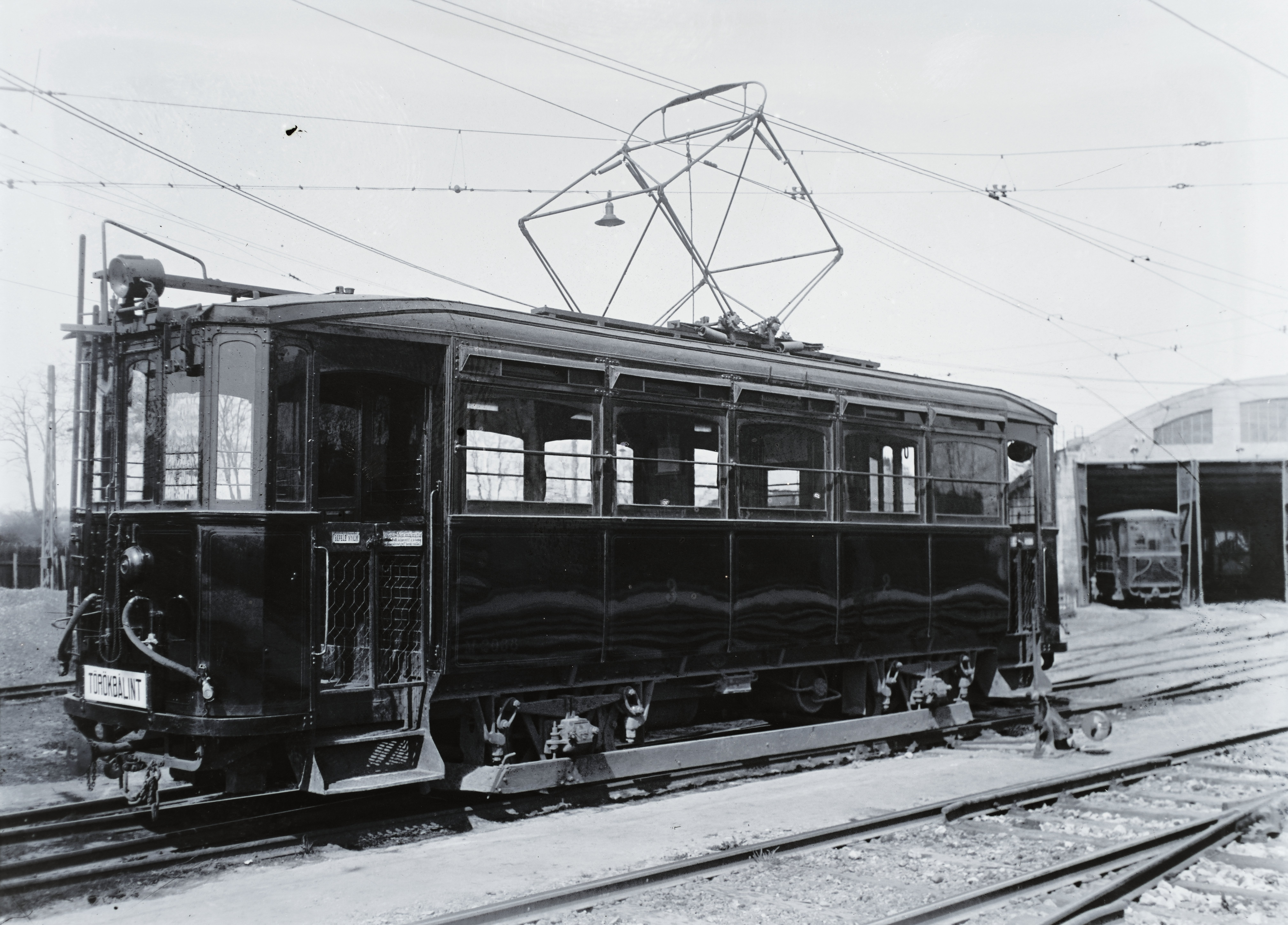 Fehérvári út (Fő utca), Budafok Forgalmi telep. A törökbálinti vonalon közlekedő »BHÉV M V típusú, M 2038 pályaszámú, BBVV eredetű (ex BBVV 38) villamos motorkocsija. Gyártás: Gép- és Vasútfelszerelési Gyár, Kistarcsa, 1914.« Leltári jelzet: 32529